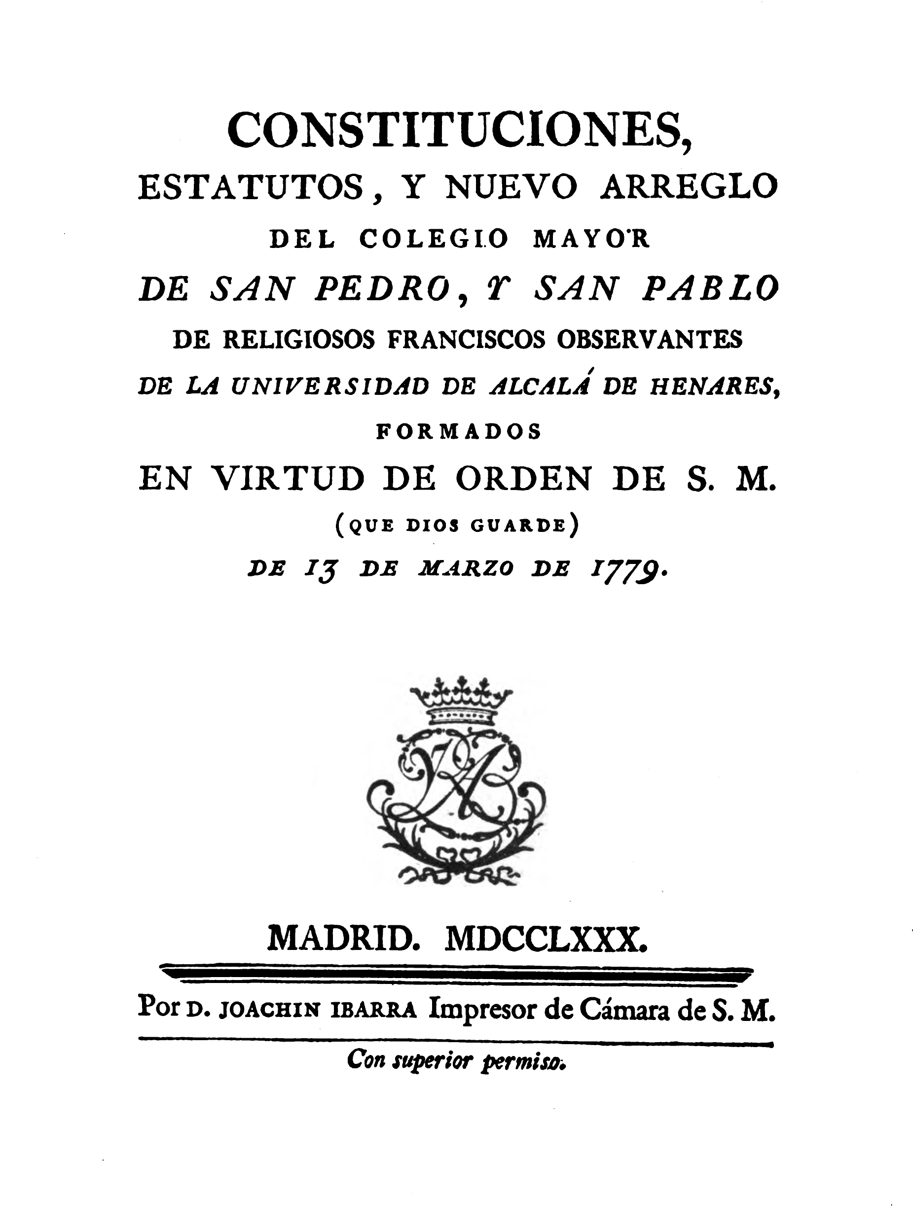 Constituciones del 13 de marzo de 1779 del Colegio Mayor de San Pedro y San Pablo de la Universidad de Alcalá.